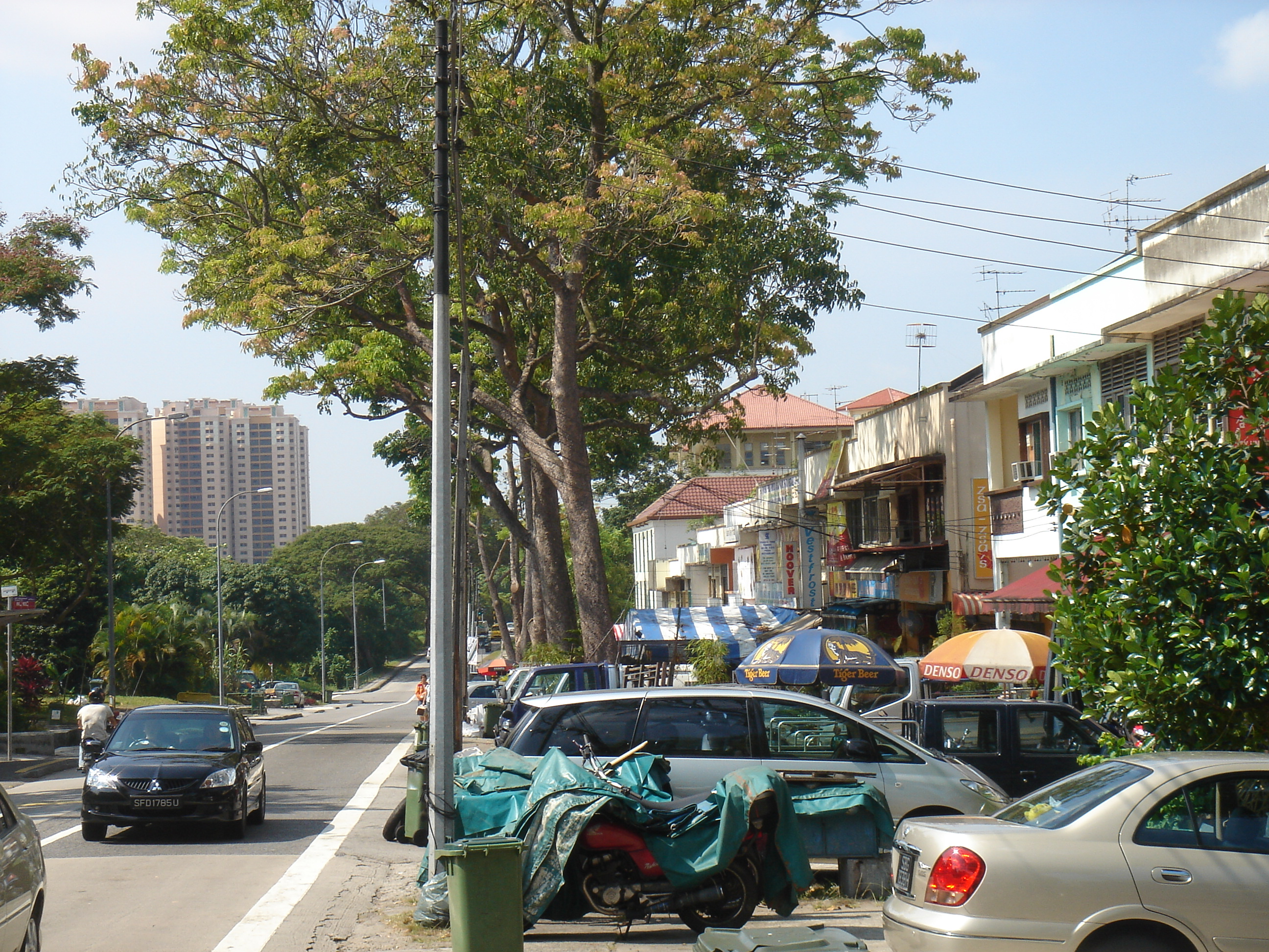 Jalan Kayu, Singapore.